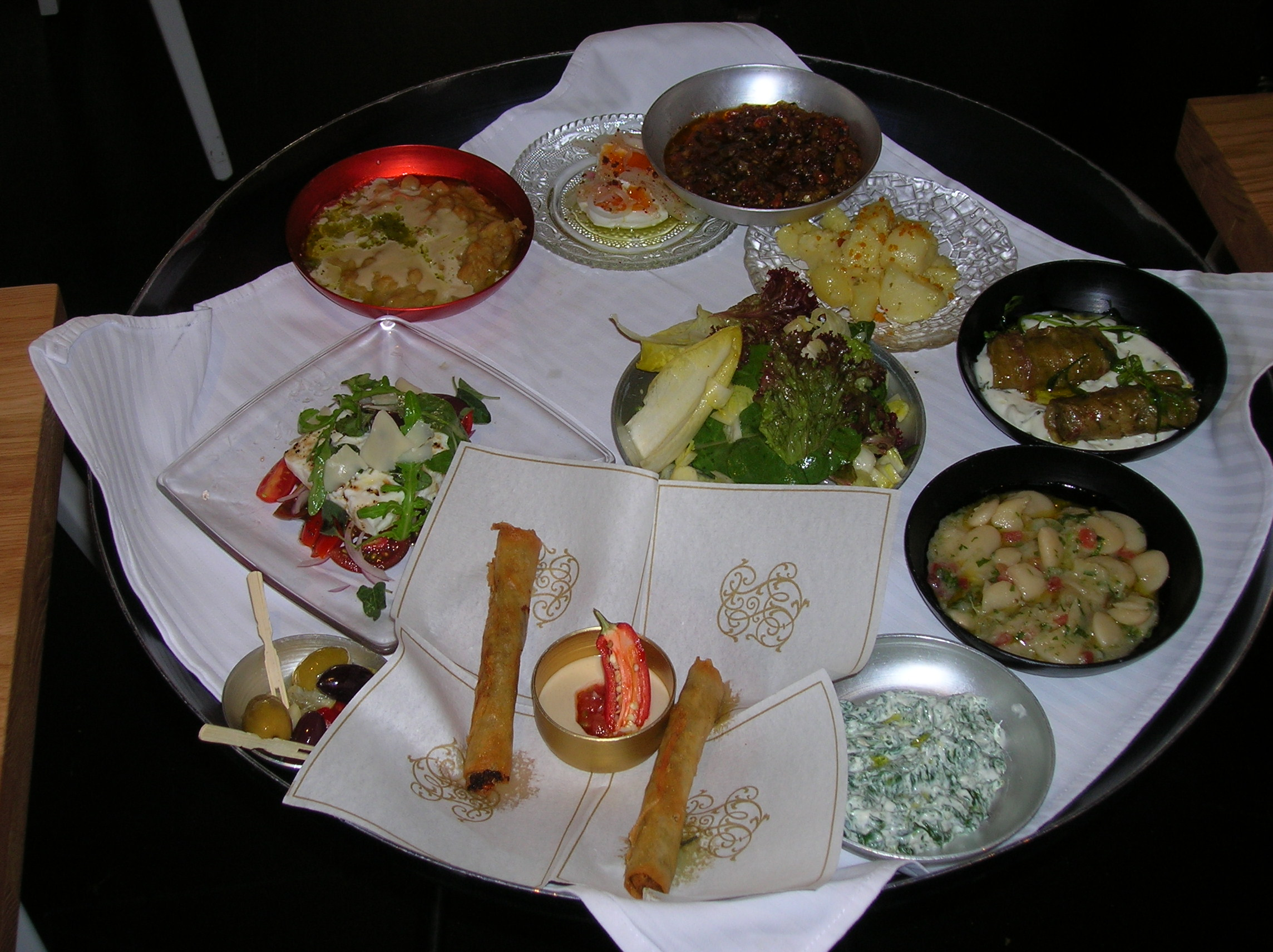 מתאבנים במסעדת רפאל